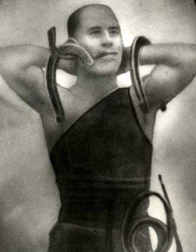 Photographie représentant Prudent "la machoire" Landry, un homme fort d'origine gaspésienne. Prudent Landry est né le 6 avril 1887 à Mission Saint-Louis. Très jeune, son entourage remarque son exceptionnelle force physique. Dès l'âge de 10 ans, il exerce le métier de bûcheron, emploi qu’il quitte en 1905 afin de rejoindre la troupe menée par son idole, le légendaire Louis Cyr. Faisant ensuite cavalier seul, se succèdent une série de tournées au Canada, aux États-Unis, en Australie et en Europe, où représentation après représentation, il réalise une série de tours de force tout aussi surprenants les uns que les autres, notamment grâce à sa mâchoire prodigieusement puissante. Pendant quelques mois, il donnera même quelques spectacles chez nos voisins du sud, en compagnie de Buffalo Bill. Pour en savoir plus: Raymond Desbiens, "Prudent Landry, le roi de la machoire", Chicoutimi, Éditions JCL, 2008, 247 pages.